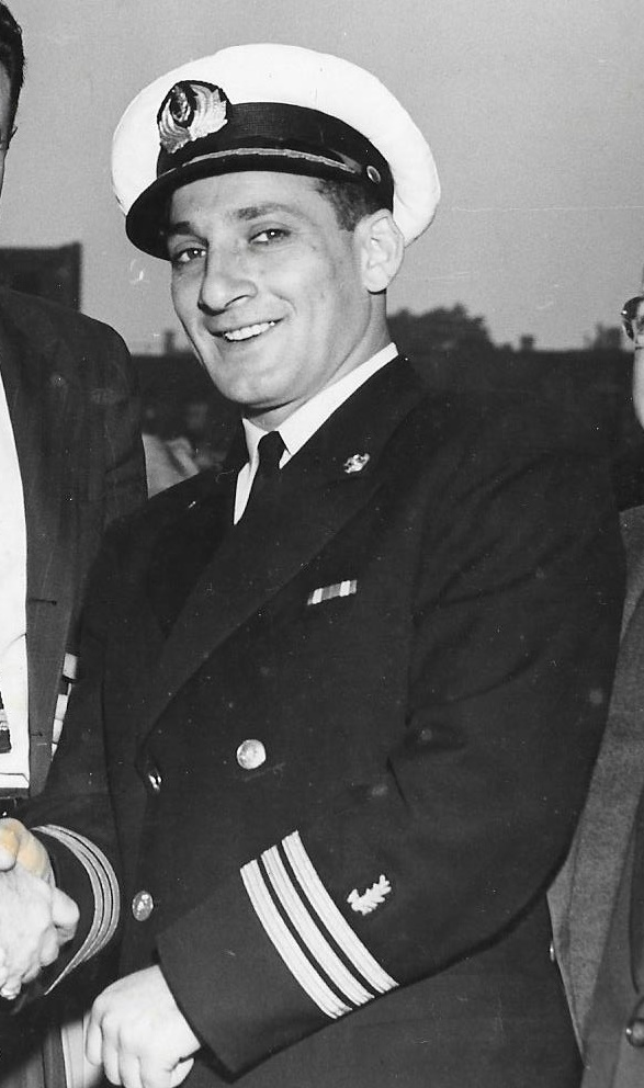 סא"ל שלמה אראל מפקד שייטת הפריגטות בעת ביקור בארצות הברית במסגרת מבצע קולומבוס 1951